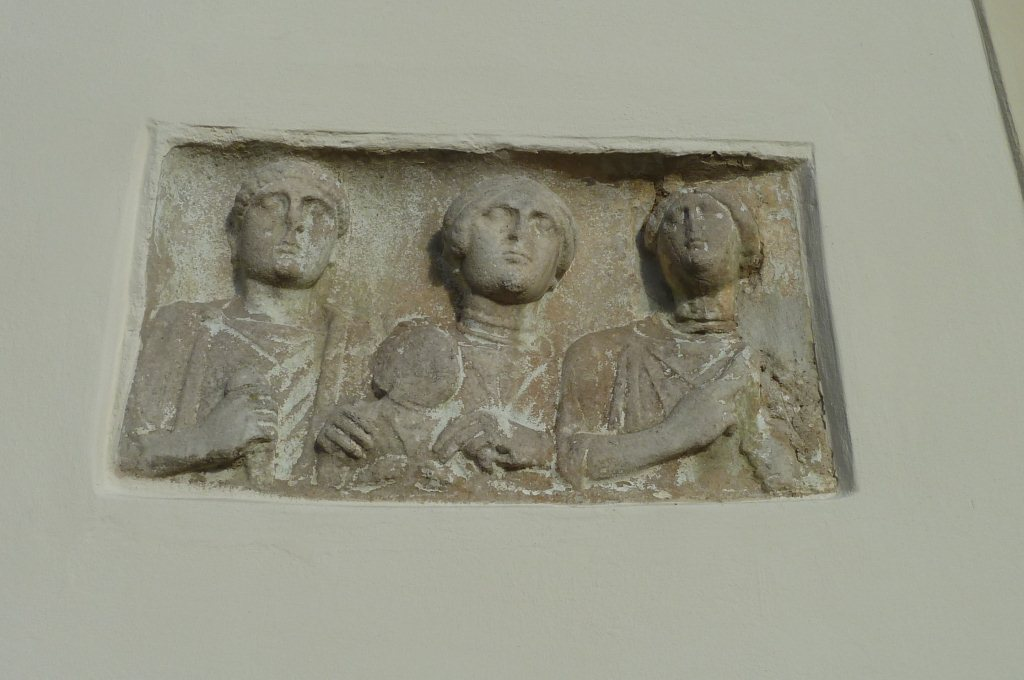 Eine Spolie (römischer Grabstein), eingemauert in die Kirche von Dobl (Steiermark)